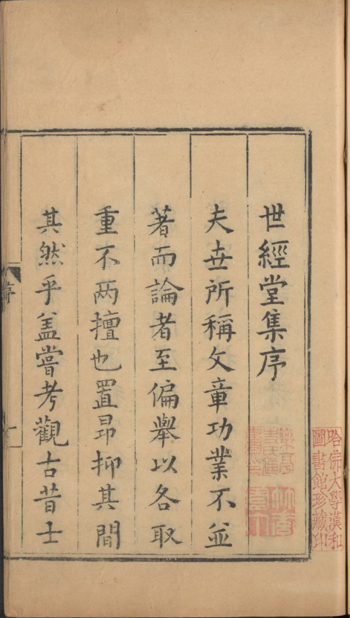 徐阶：《世经堂集》序言第一页